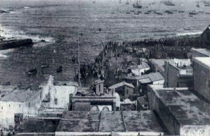 Le port de Casablanca en 1900.